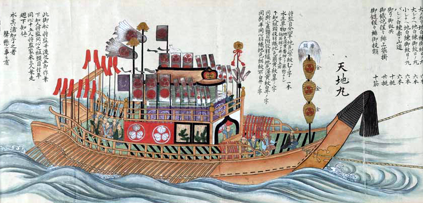 『将軍乗船図』 -御召御関船七十六挺立。江戸時代の作品。